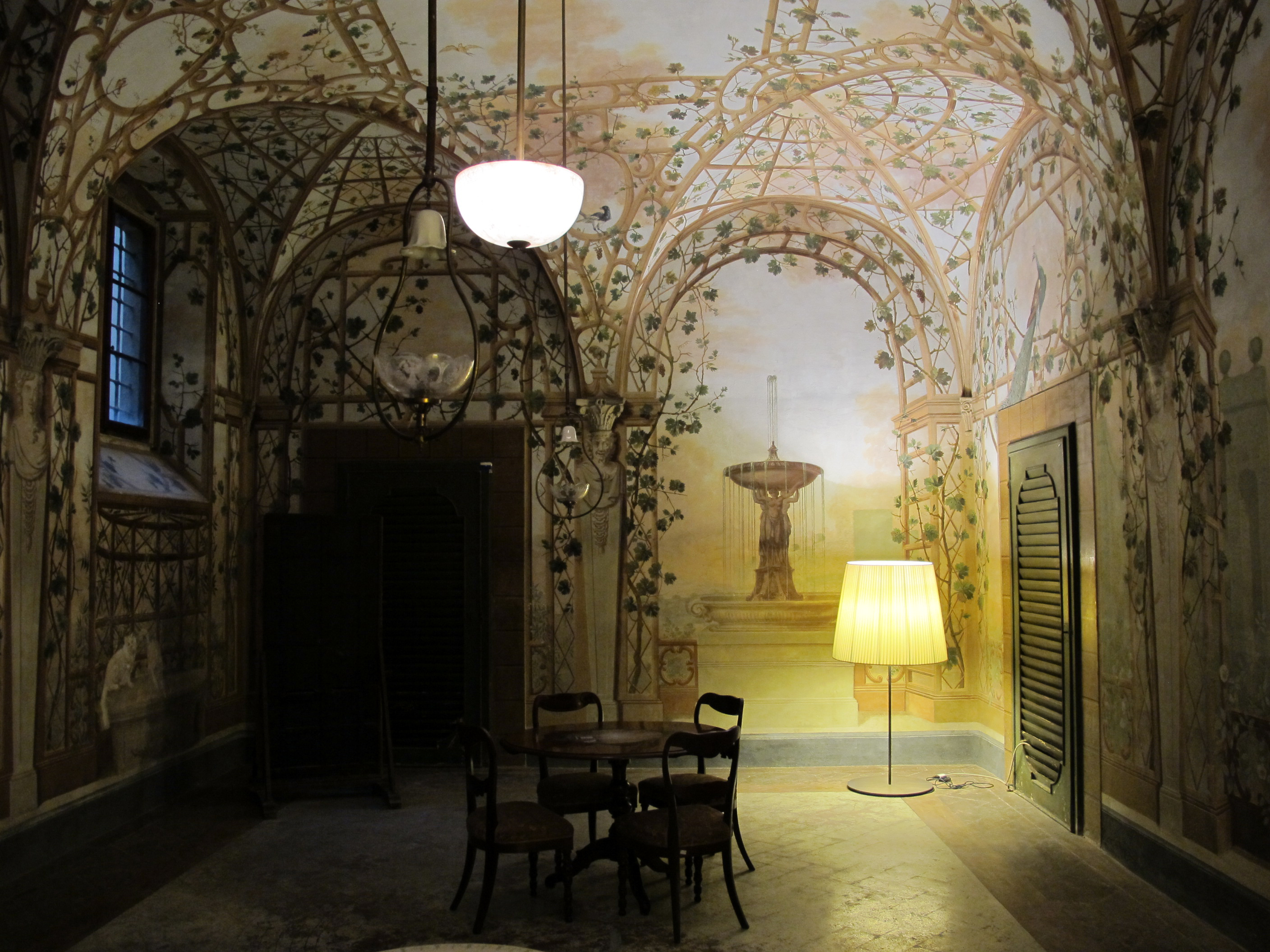 Museo di Casa Martelli - MIBAC This is a photo of a monument which is part of cultural heritage of Italy.